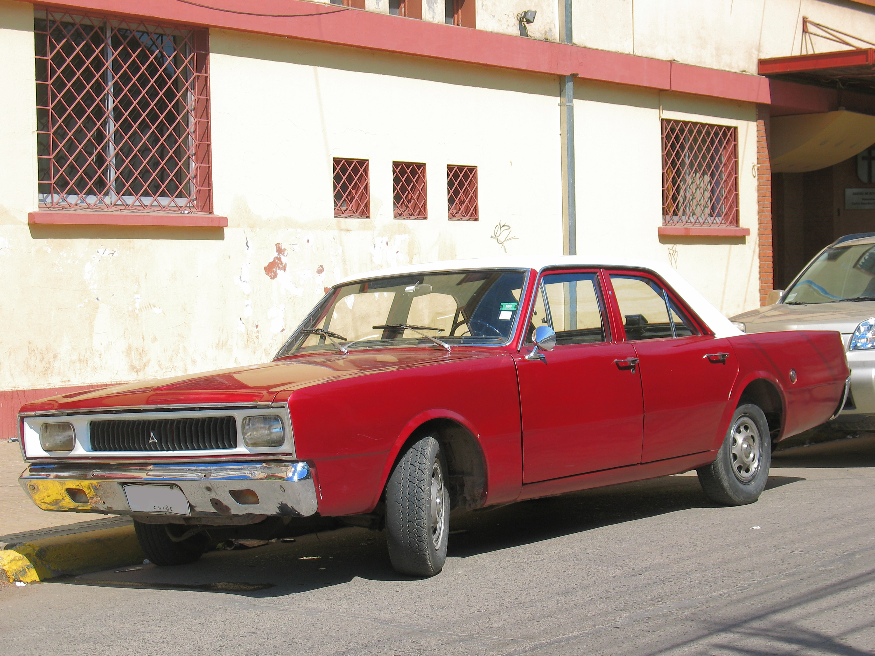 Dodge Polara Sedan 1973